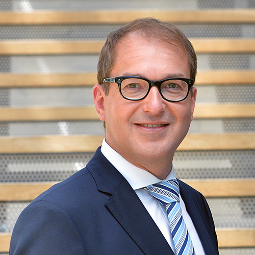 Alexander Dobrindt, MdB (2017)